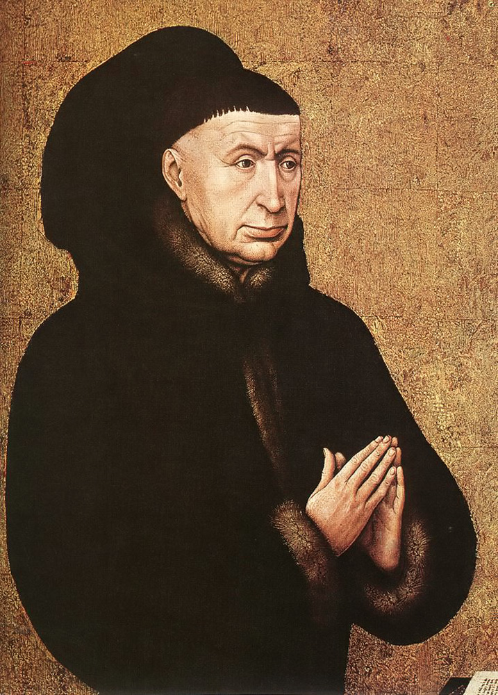 founder of Hôtel-Dieu in Beaune.